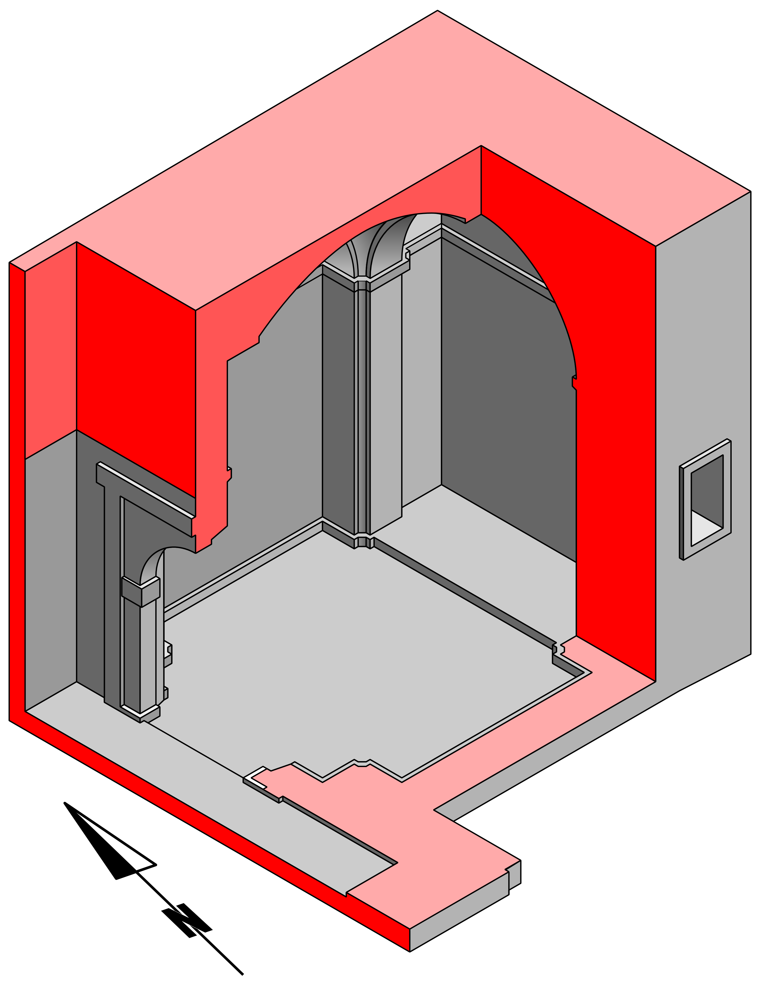 Corte esquemático de la capilla del Palacio de Villabona (Llanera), en Asturias (España)